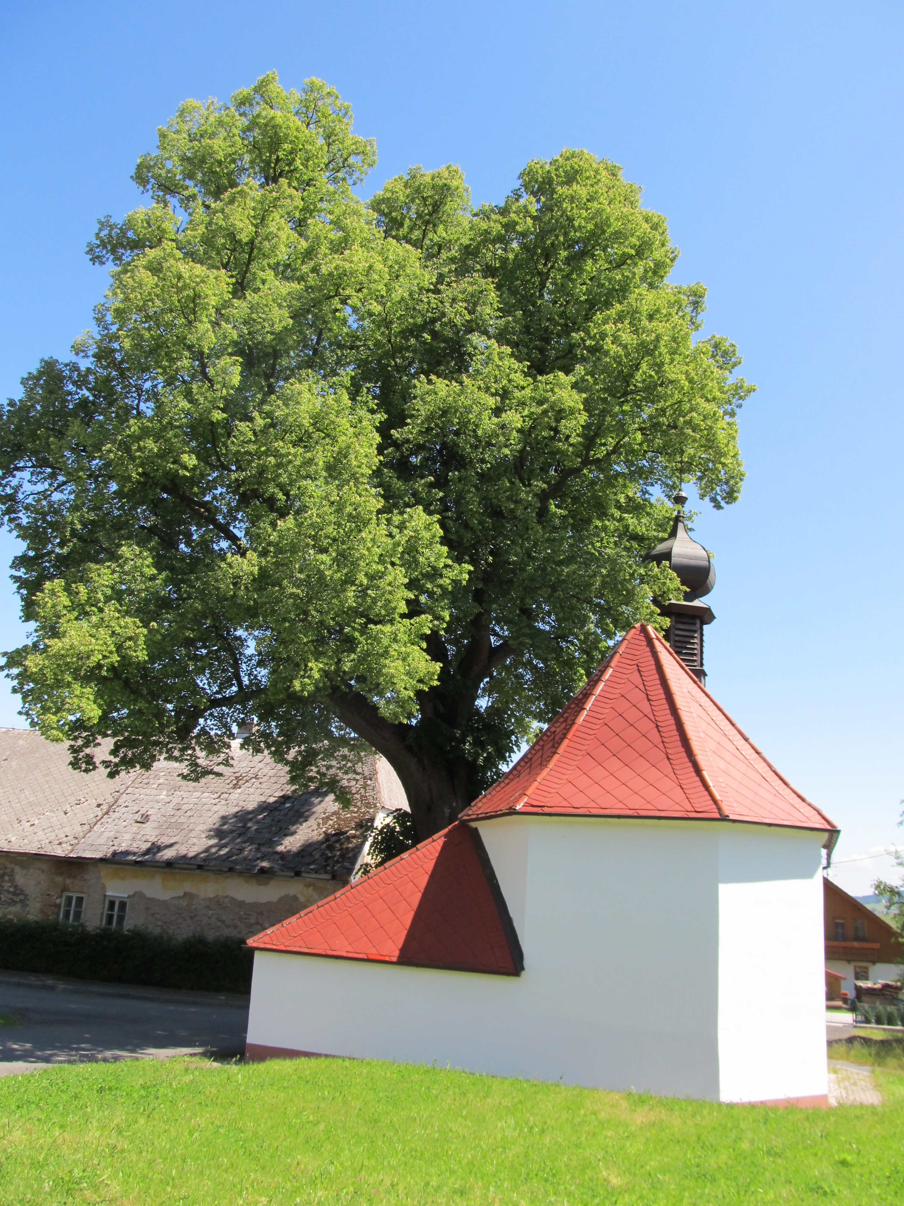 Chudenín - kaple Panny Marie a památná lípa